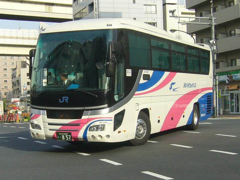 登録番号：なにわ200か・857 西日本ジェイアールバス(West JR Bus)所属 car no.647-5986 超得割青春号用 日野・セレガ ADG-RU1ESAA